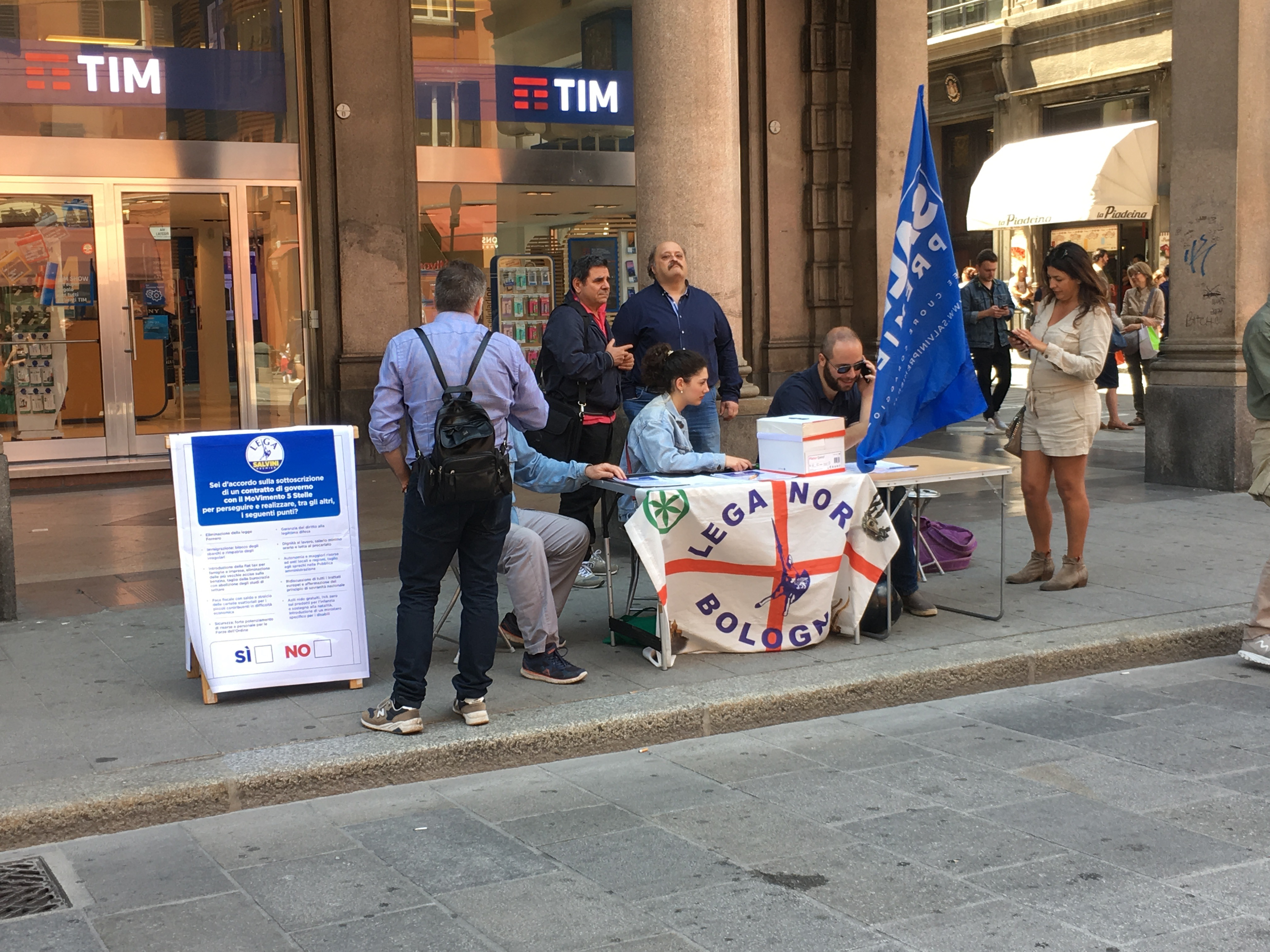 Gazebo della Lega a Bologna il 19 maggio 2018, in occasione del "referendum" sul Contratto di Governo siglato con il Movimento 5 Stelle